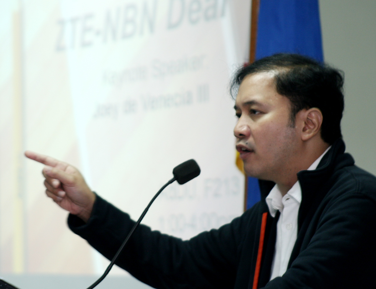 Filipino politician Joey de Venecia